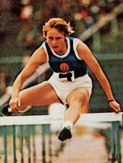 CAMPIONI dello SPORT 1973/74-Figurina n.26- EHRHARDT -ATLETICA LEGGERA-Rec